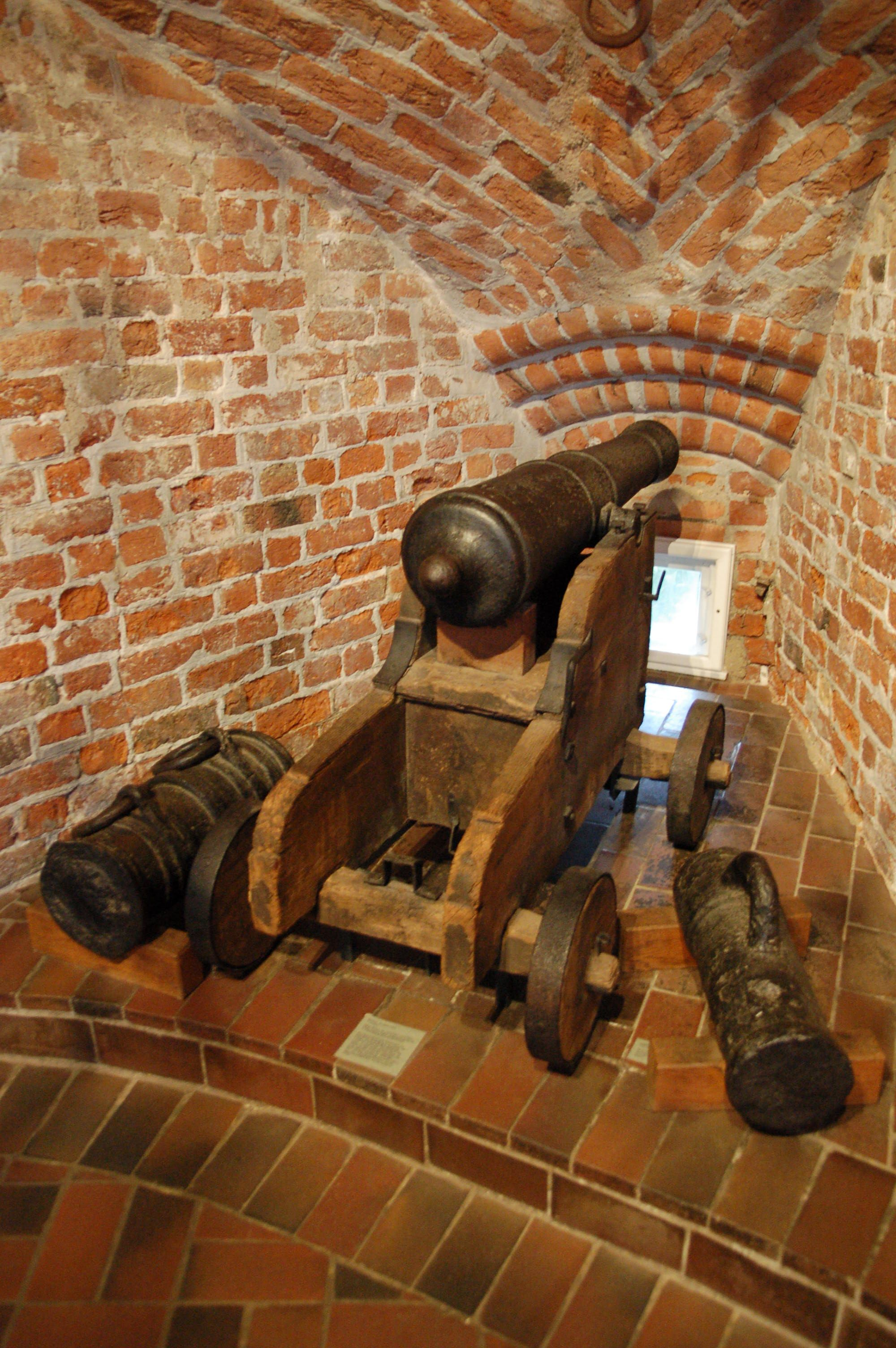 Guns inside Holstentor, Lübeck